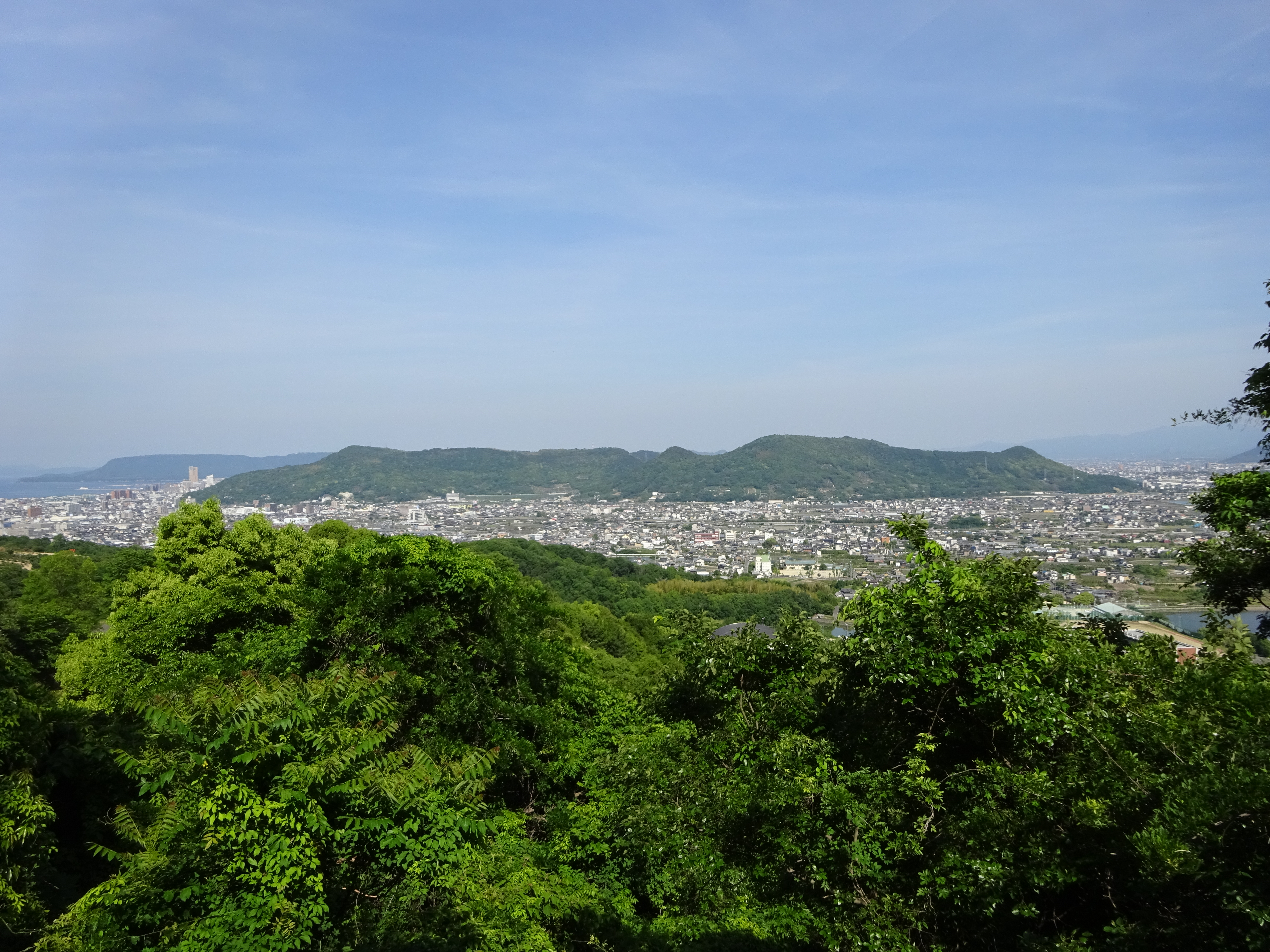 西方（五色台の山麓）より石清山塊を望む